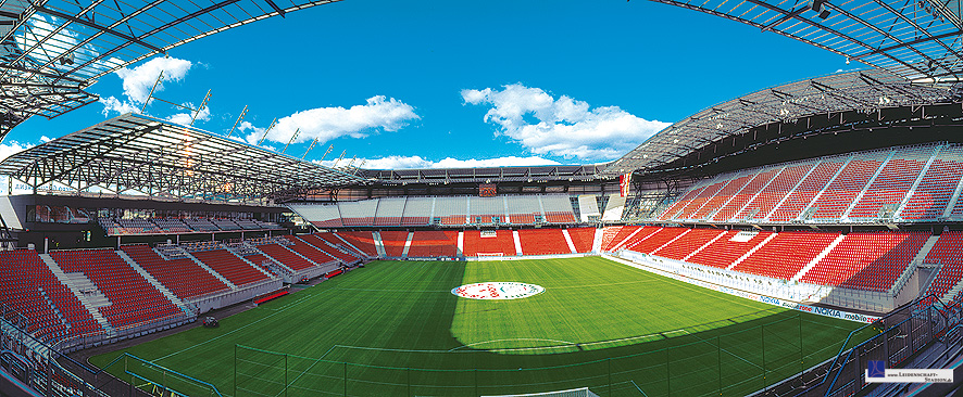 Das Wörtherseestadion in Klagenfurt war einer der acht Austragungsorte zur EM 2008 Schweiz/Österreich.